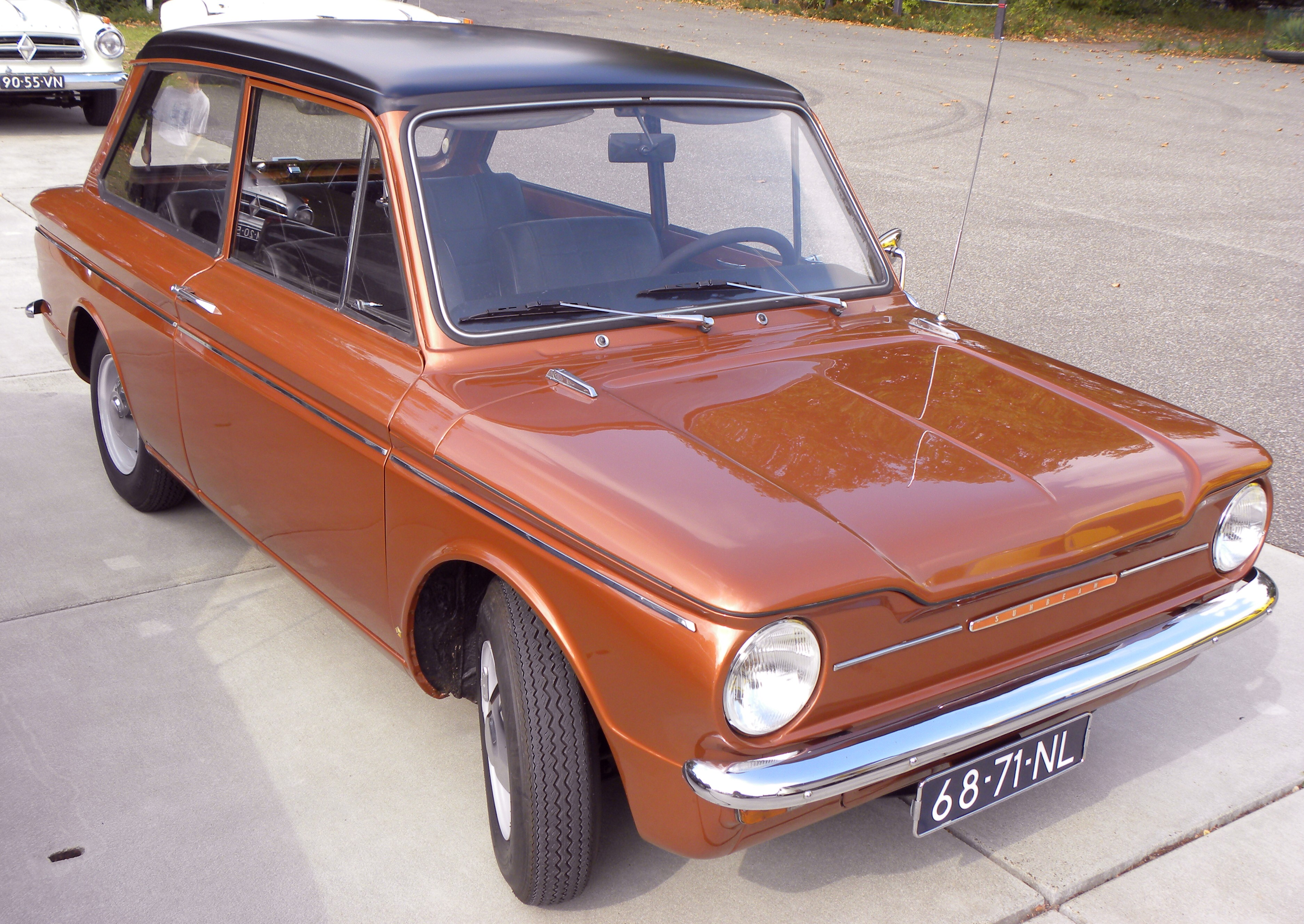 Hillman Imp Sunbeam